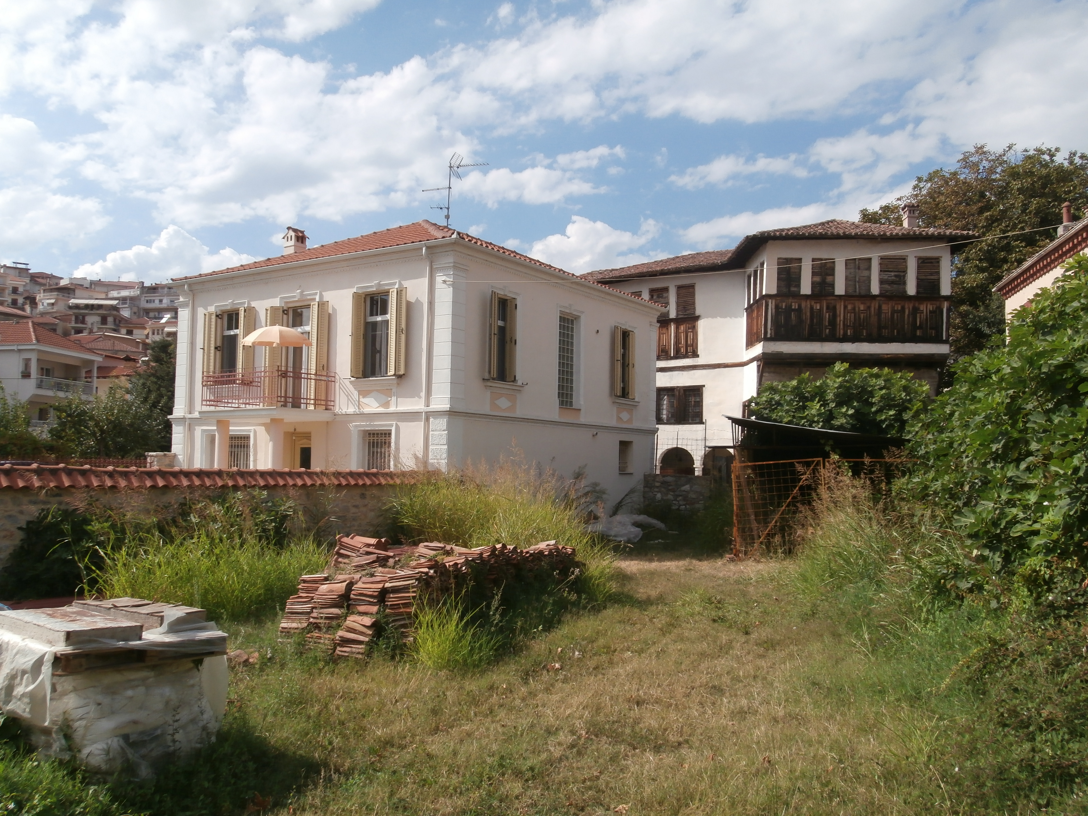 Συνοικία Ντόλτσο«Συνοικία Ντόλτσο»